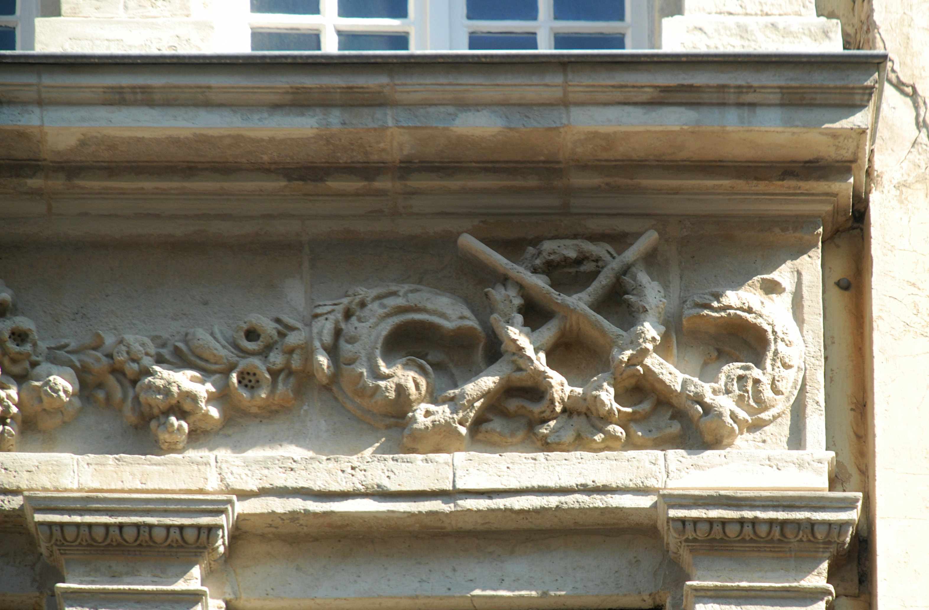 Belgique - Bruxelles - Maison de l'Agneau Blanc (rue du Marché aux Herbes 42 - baroque)